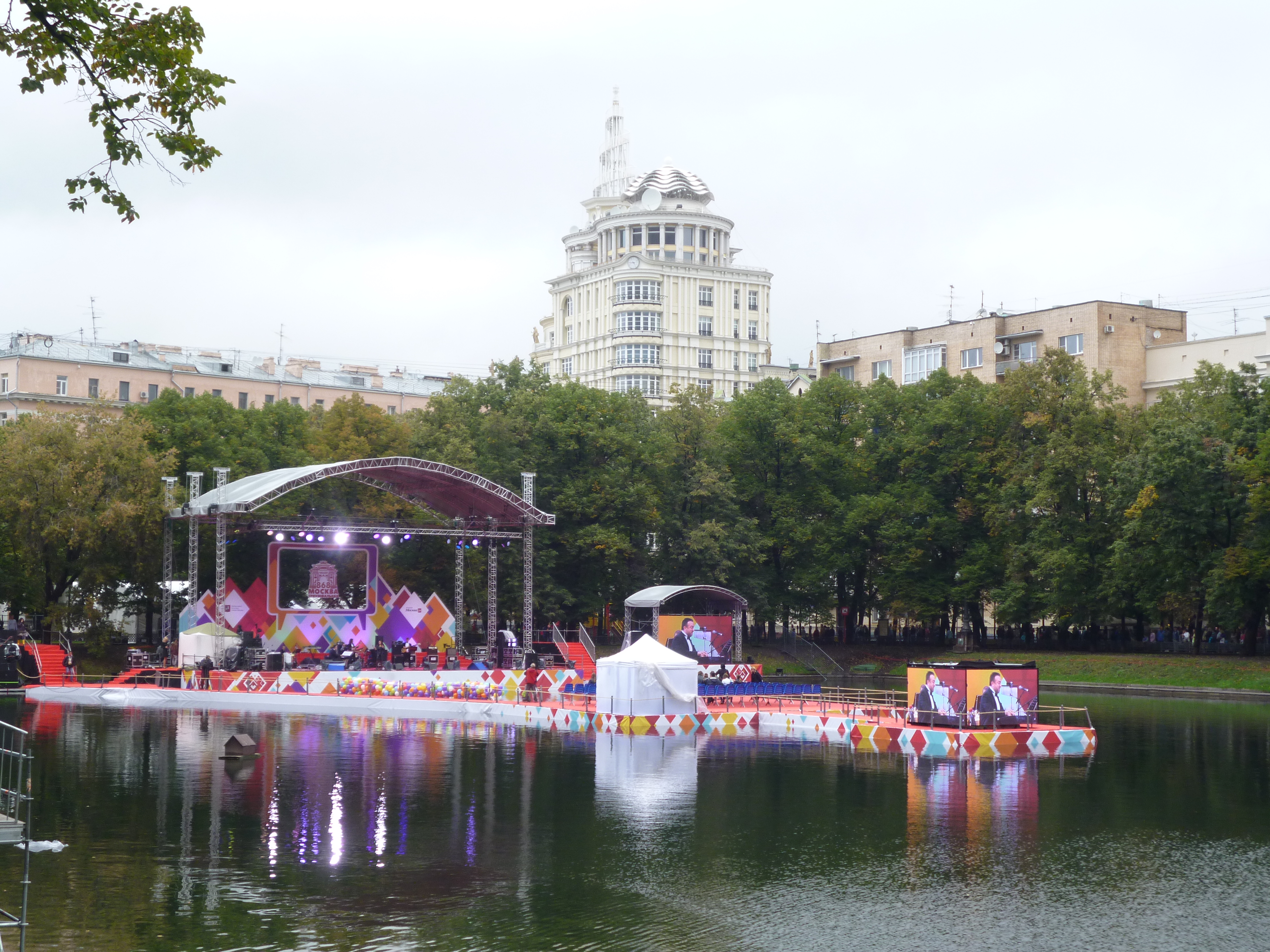 Парк Патриаршие пруды: Бронная М. ул., вл. 30-42, Пресненский, Центральный округ, Москва